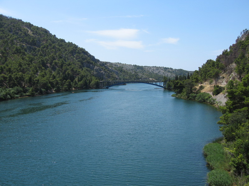 National park Krka